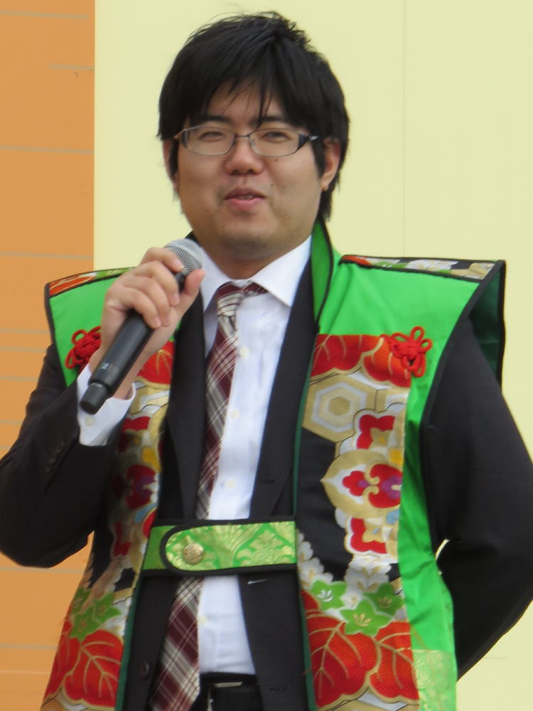 将棋棋士の糸谷哲郎（平成２８年１１月、姫路市で行われた人間将棋にて）